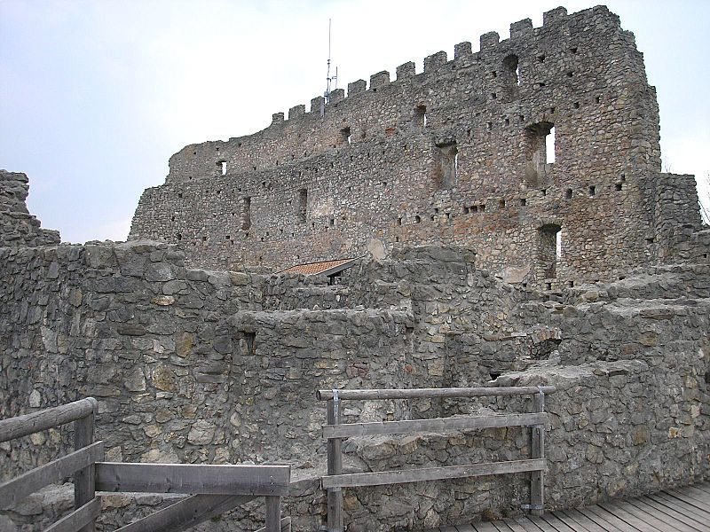 Burg Eisenberg bei Pfronten (Allgäu). Die Kernburg.